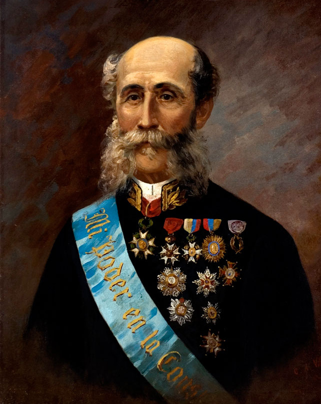 Juan Antonio María Flores y Jijón de Vivanco (23 October 1833 – 30 August 1915)